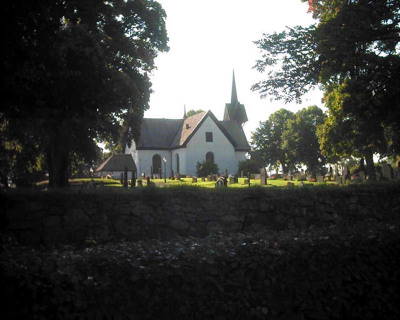 Kyrkan i Barnarp. Photo taken by me 25 Sept 2005.